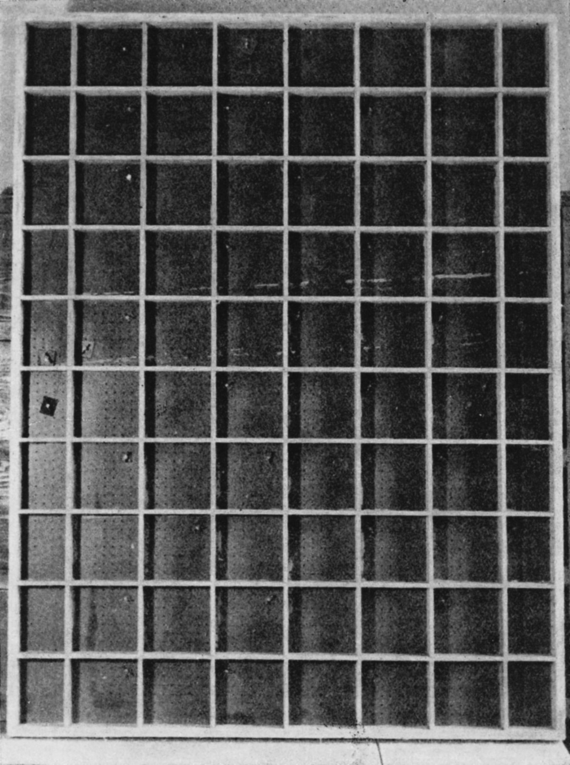 Prace konserwatorskie przy malowidłach z Faras w Muzeum Narodowym w Warszawie. Odwrocie pudła przygotowanego pod malowidło.